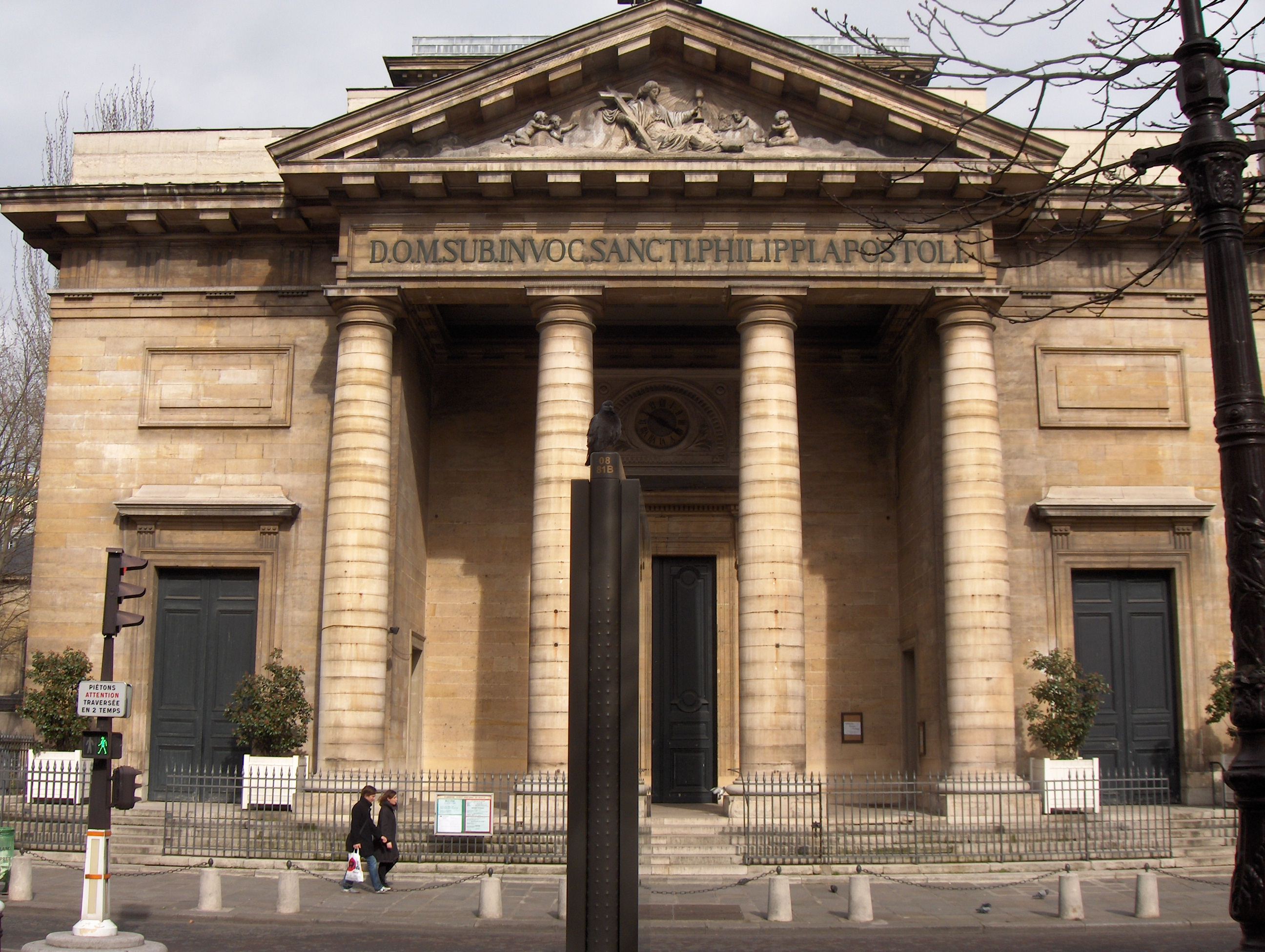 L'église de Saint-Philippe-du-Roule, Paris 8ème